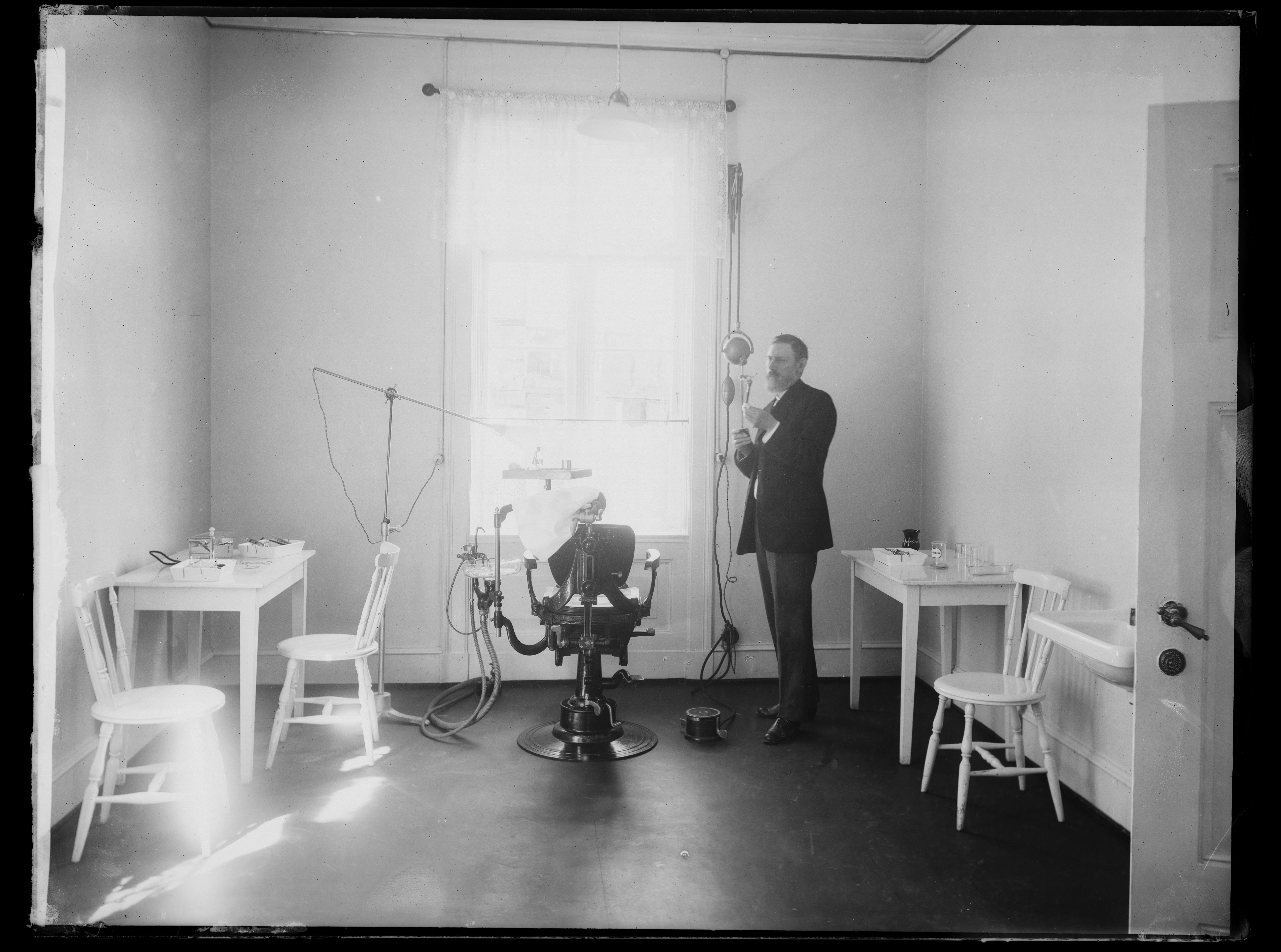 Bildet er hentet fra Nasjonalbibliotekets bildesamling. Anmerkninger til bildet var: Påskrift arkivark: Skoletandkliniken Parkveien Eldste arkivnummer: 381 Oslo, Oslo